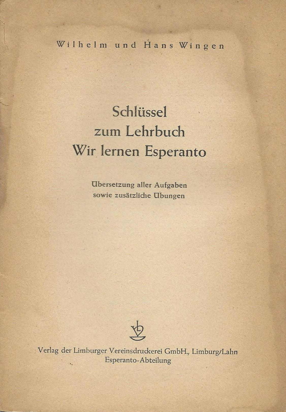 interna librokovrilo de "Schlüssel zum Lehrbuch : Wir lernen Esperanto", 1950